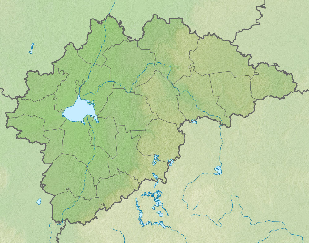 Физическая карта Новгородской области Проекция — равноугольная. Стандартная параллель — 58°12′00″с.ш. Параметры шаблона (координаты краёв): |top = 59.6 |bottom = 56.7 |left = 29.5 |right = 36.5